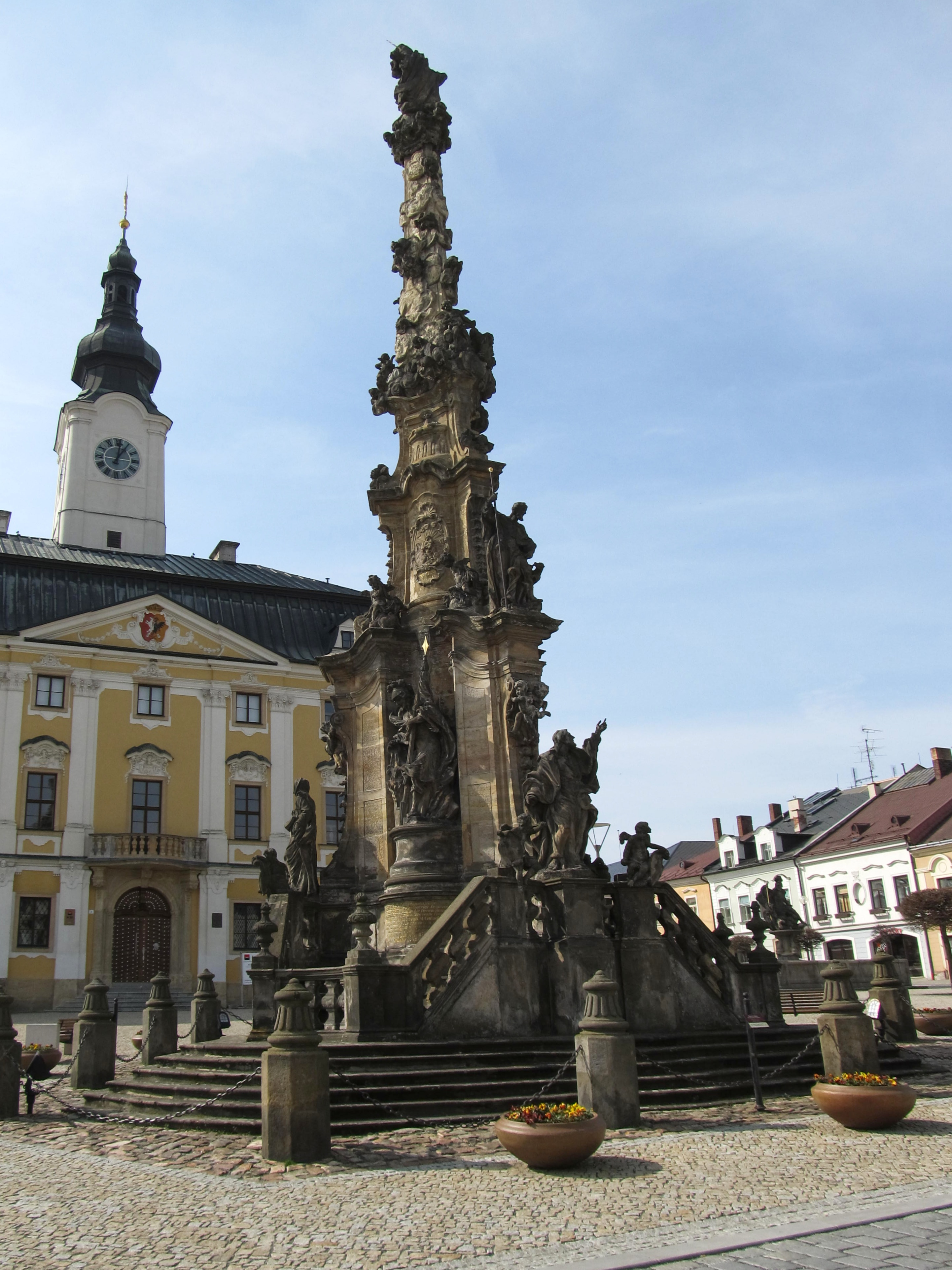 Radnice (1739-1744) a morový sloup (1727-1731) na Palackého náměstí v Poličce.